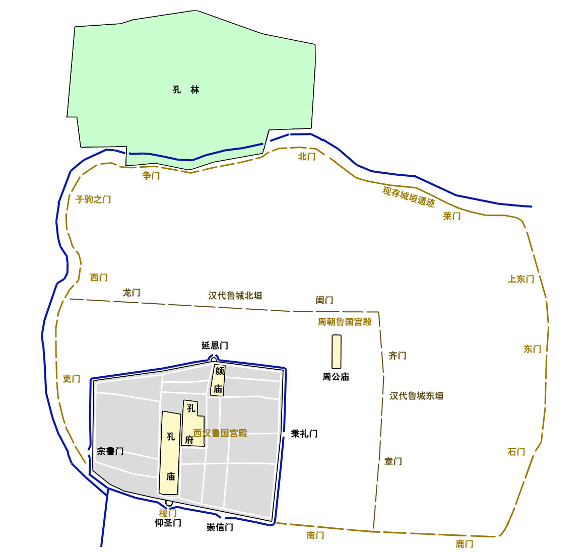 曲阜城垣变迁示意图，浅棕色为周朝鲁城范围，深棕色为汉代鲁城范围，黑色为明代曲阜县城